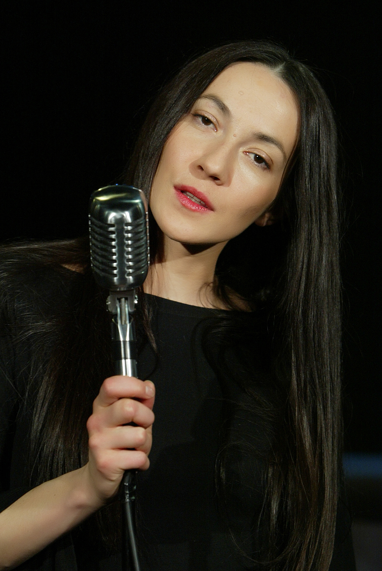 Iwona Loranc w Teatrze Muzycznym Roma